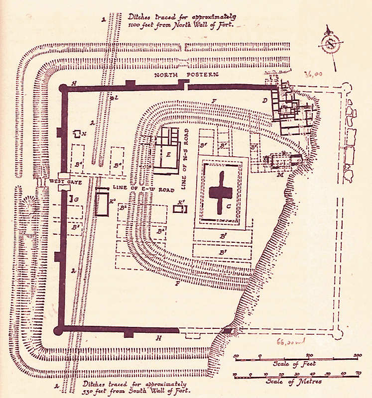 Richborough Furchadennoù 1925